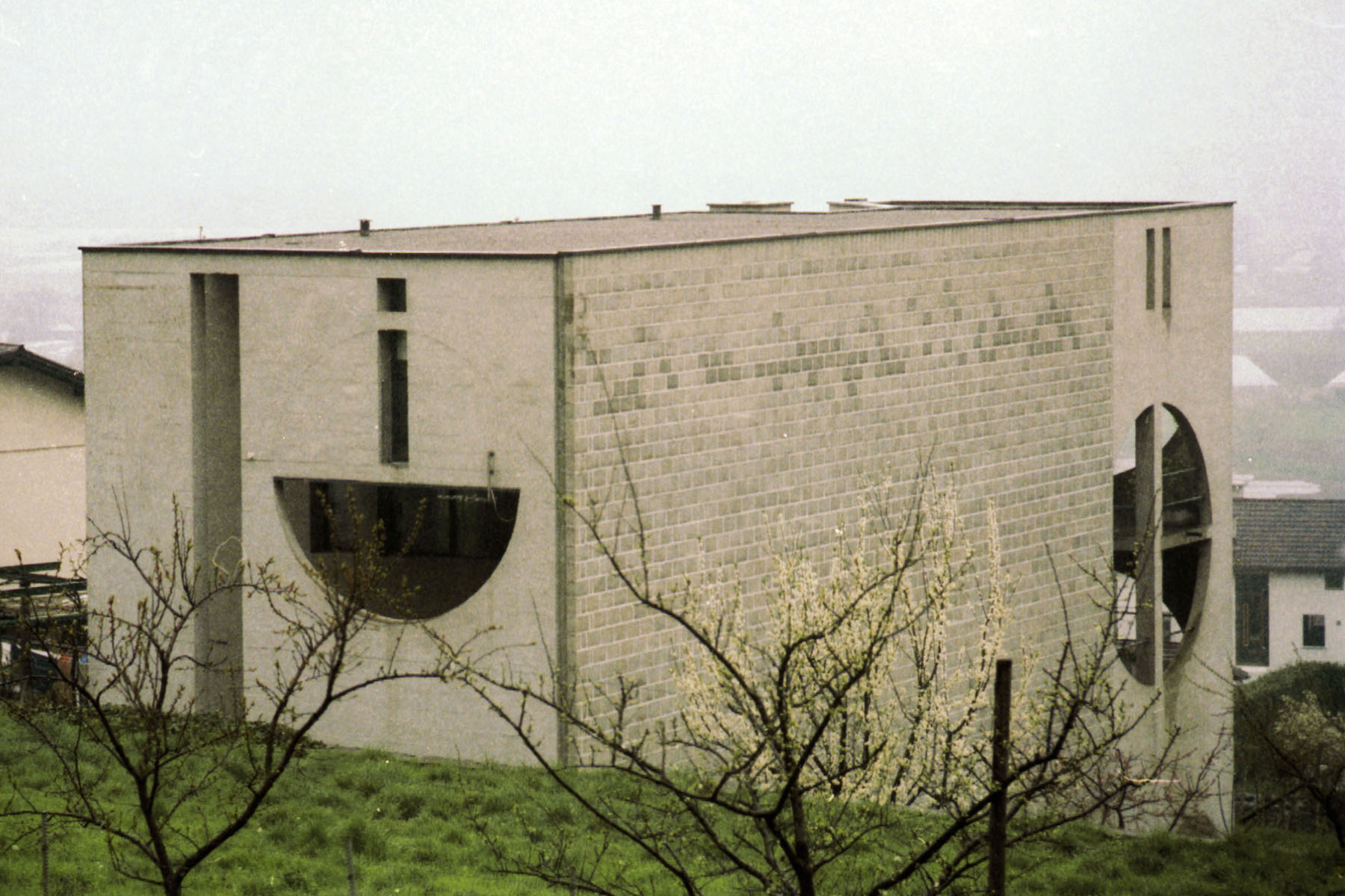 Cadenazzo, Casa Caccia (arch. Mario Botta 1970-71)